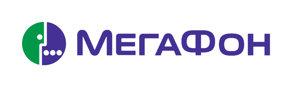 Логотип МегаФон с 2002 по 2007 год.